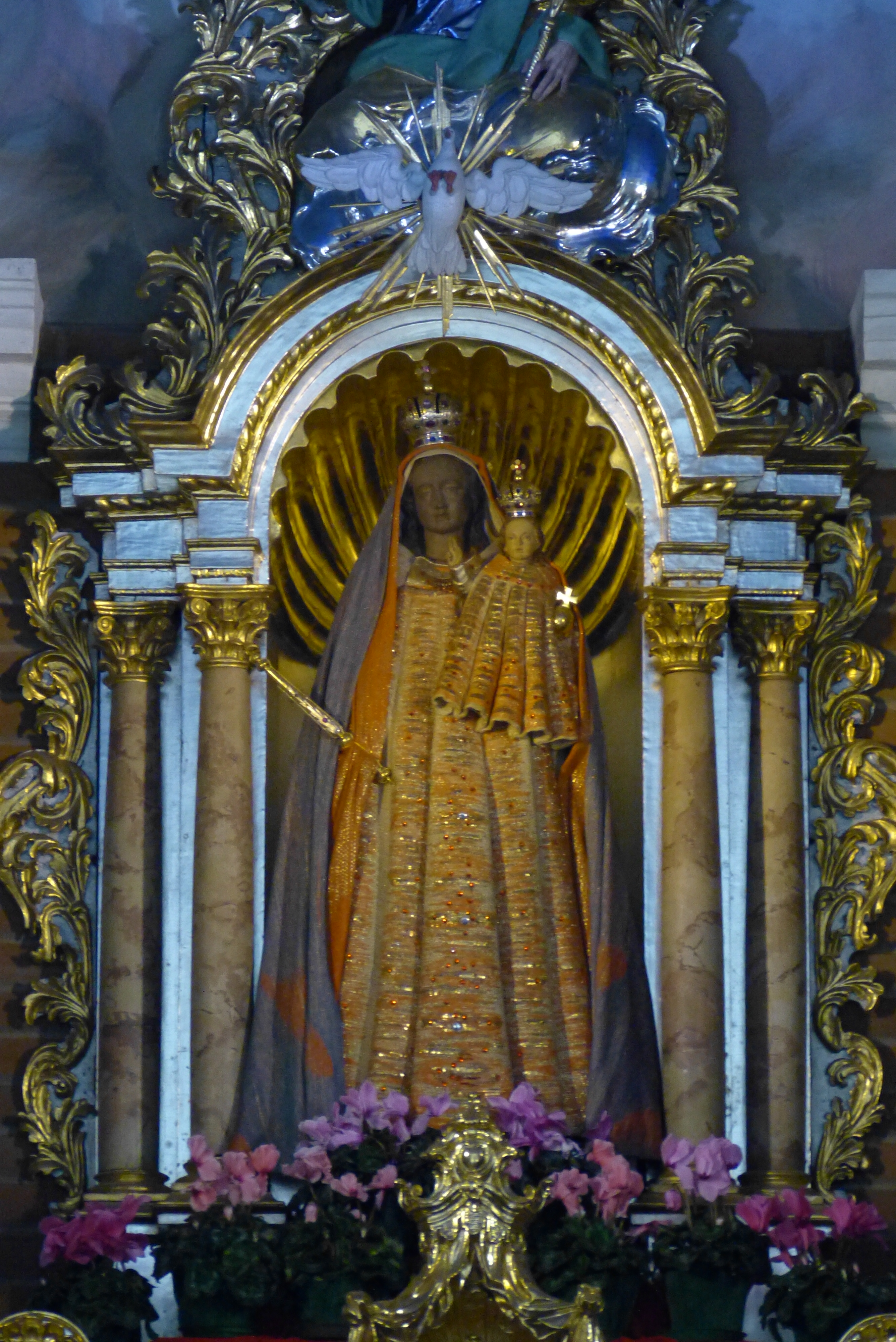 Gnadenbild in der Gnadenkapelle in der Wallfahrtskirche St. Maria von Loreto auf dem Kobel in Westheim (Neusäß)